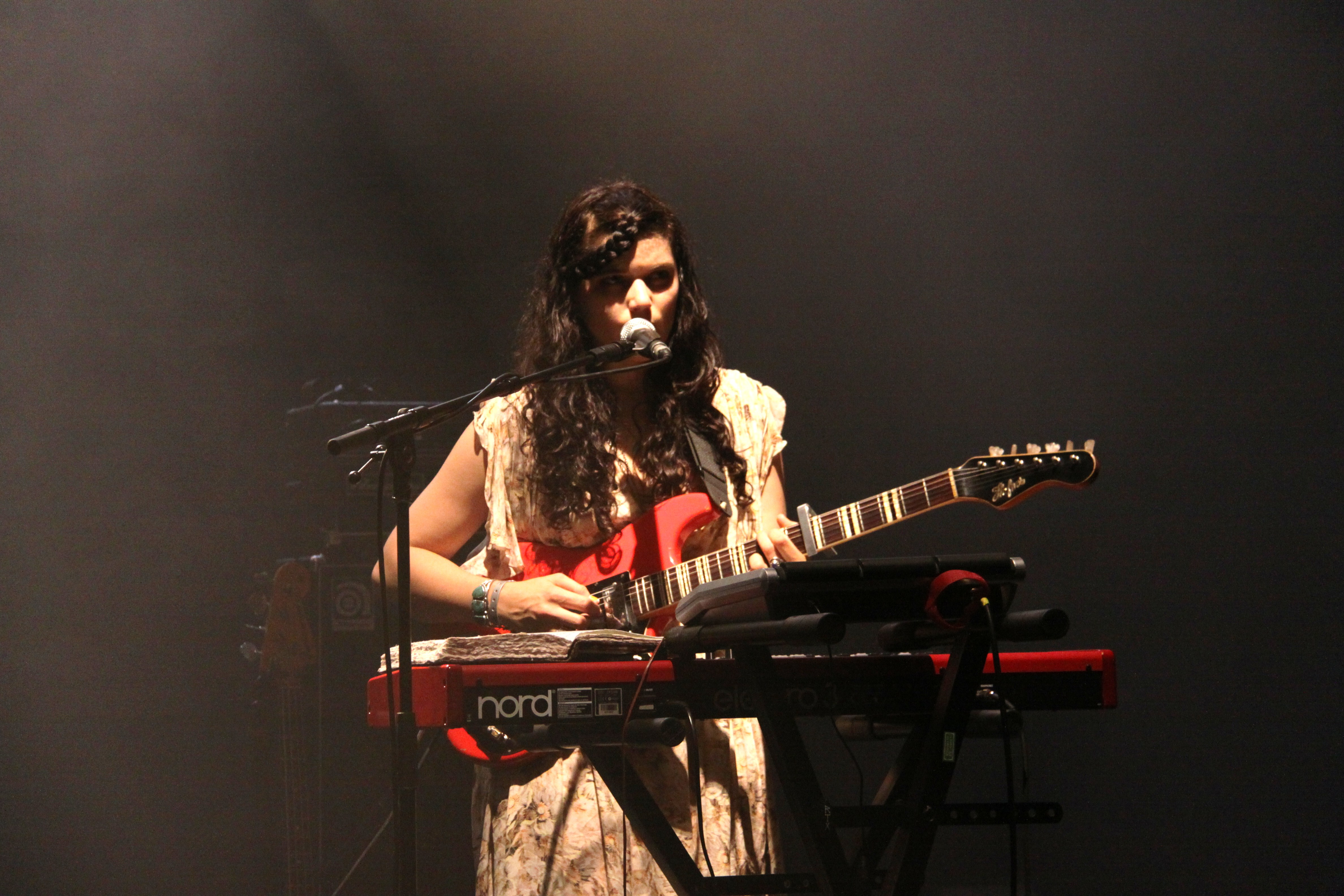 La chanteuse Soko (Stéphanie Sokolinski) lors de ses premières Francofolies en juillet 2012. « Premières Francos » au théatre Verdière de La Coursive. Francofolies de La Rochelle 2012 (11 au 15 juillet). La Rochelle, Charente Maritime, France.